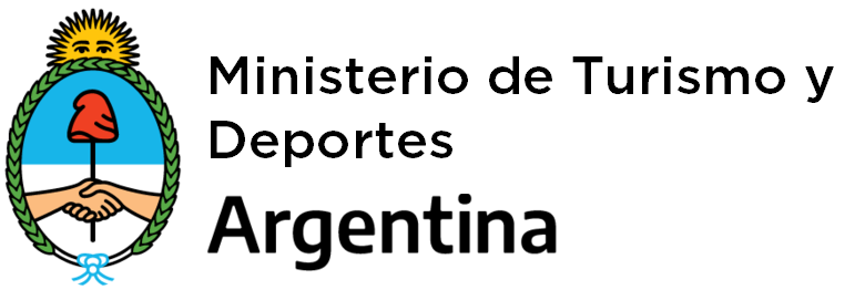 Ministerio de Turismo y Deportes